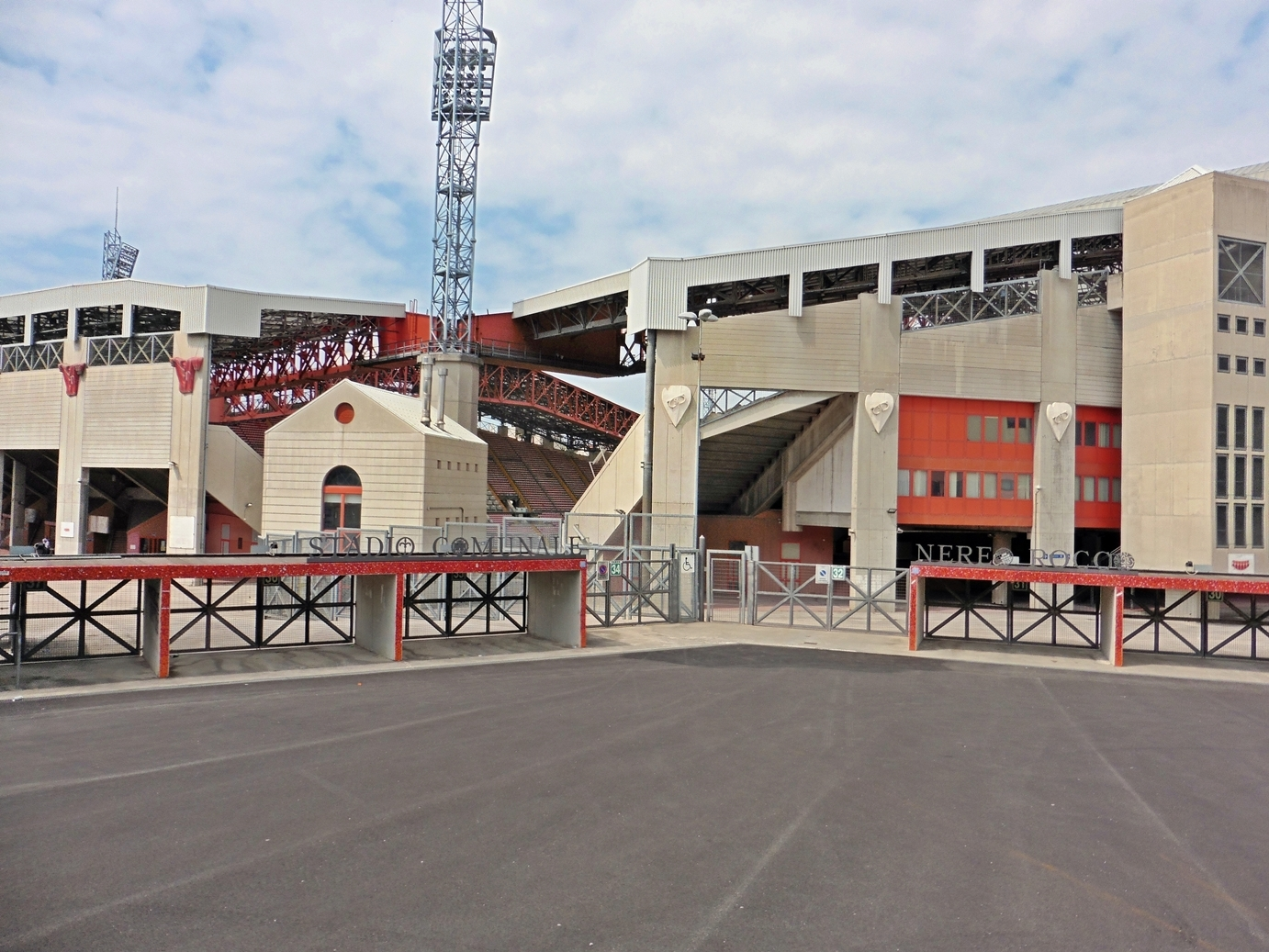 Eingang zur Süd- und Osttribüne des Stadio Nereo Rocco in Trieste. Aufgenommen im April 2015